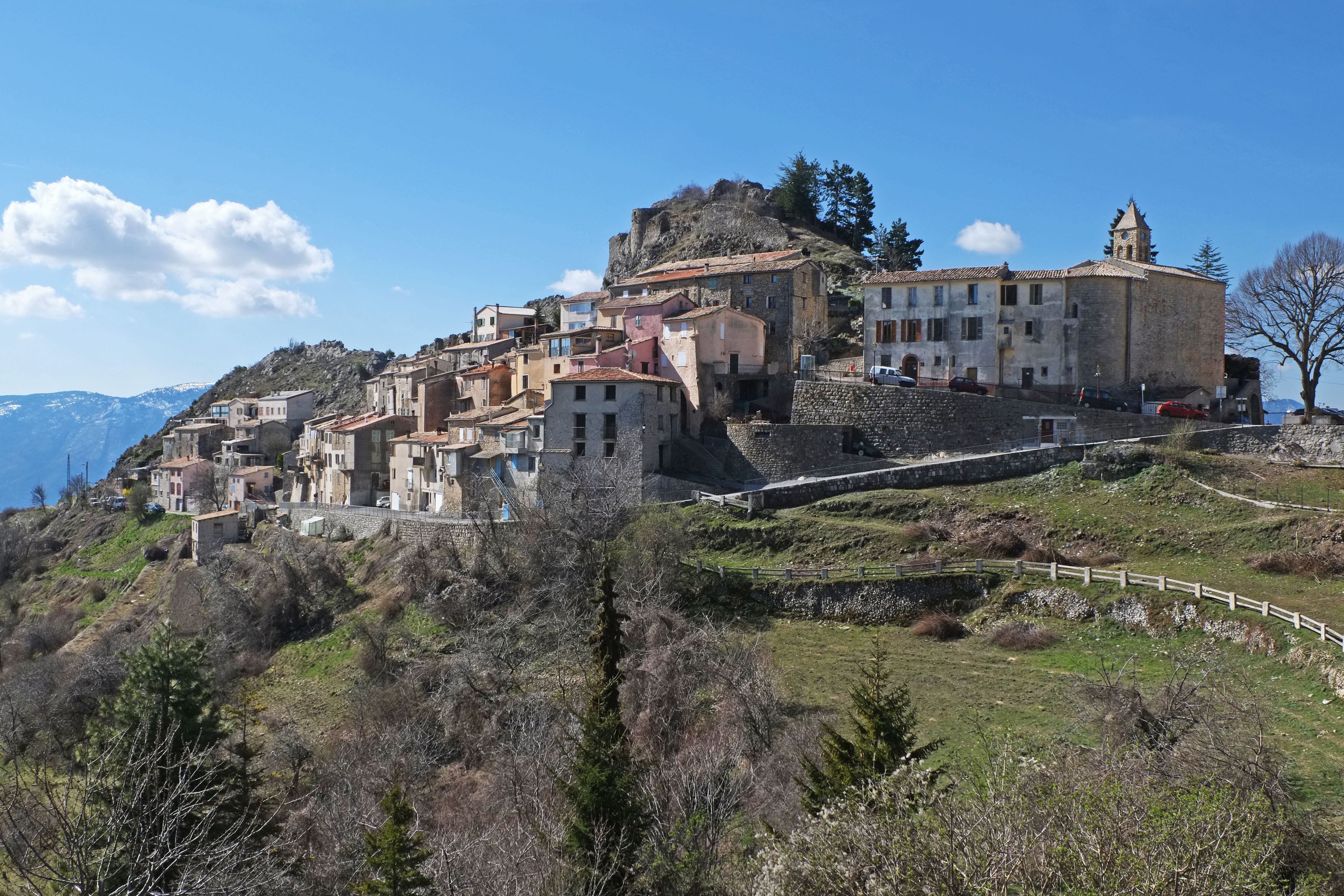 Vue sur le village d'Ascros en venant de Toudon